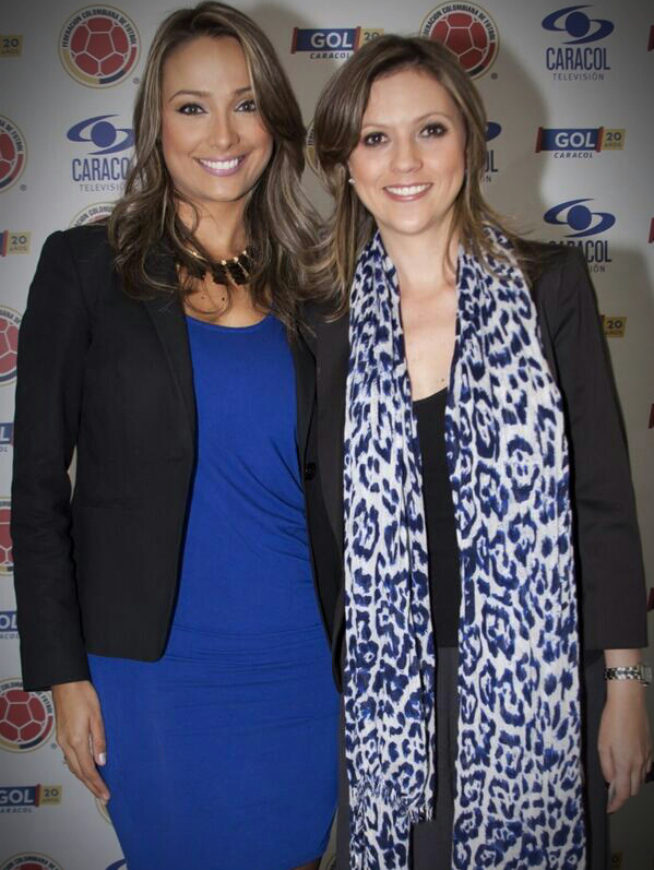 Mónica Jaramillo y Catalina Gómez Sánchez durante un evento de Caracol Televisión en 2014